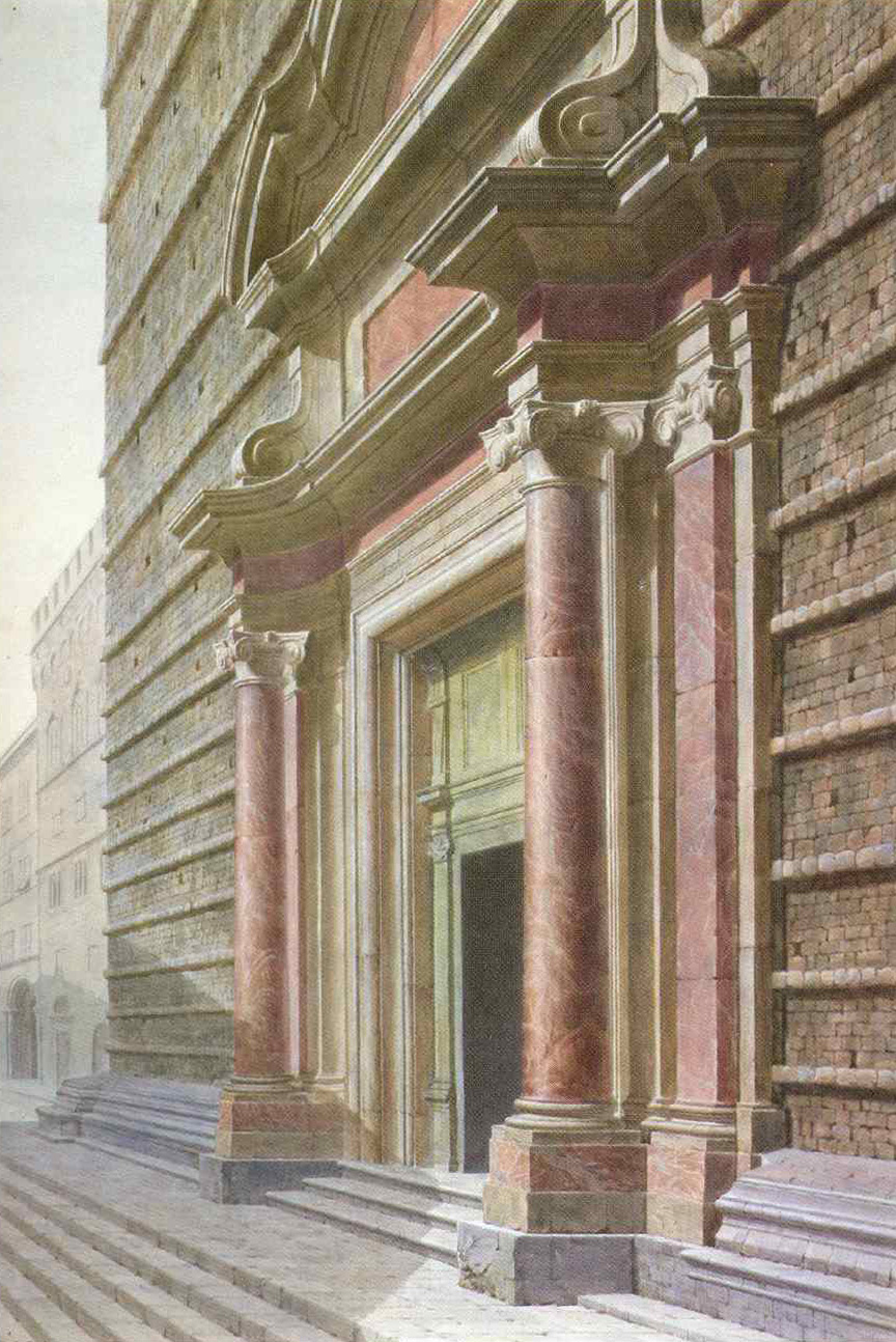 Portale di San Lorenzo a Perugia, 1884 (acquerello su carta)